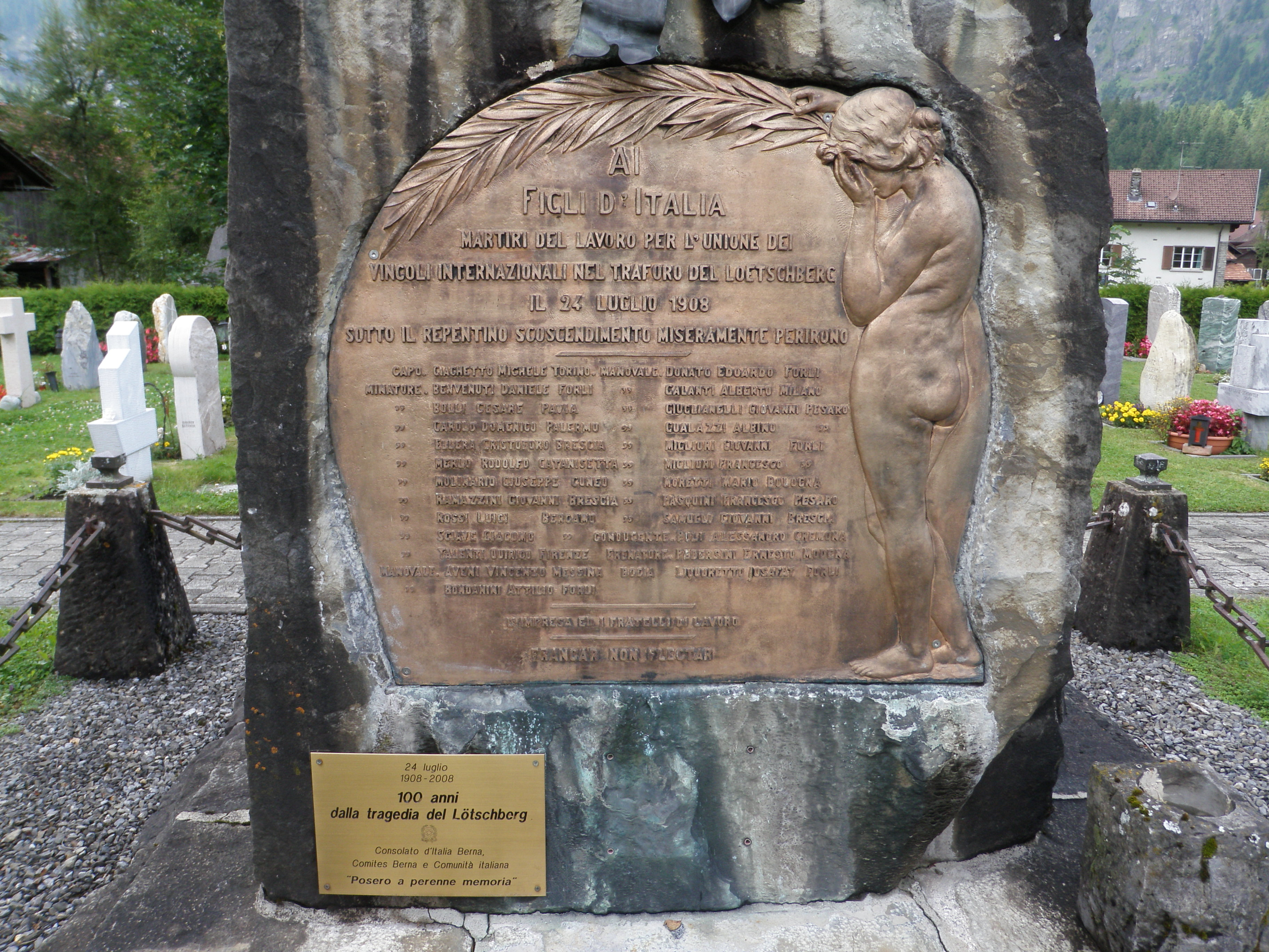 Denkmal für die im Lötschbergtunnel ums Leben gekommenen Arbeiter auf dem Friedhof von Kandersteg